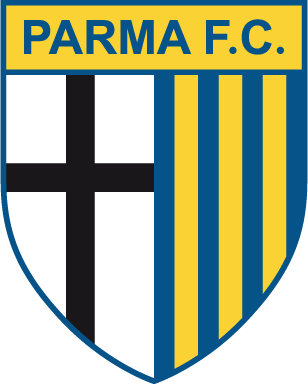 Parma FC logosu.